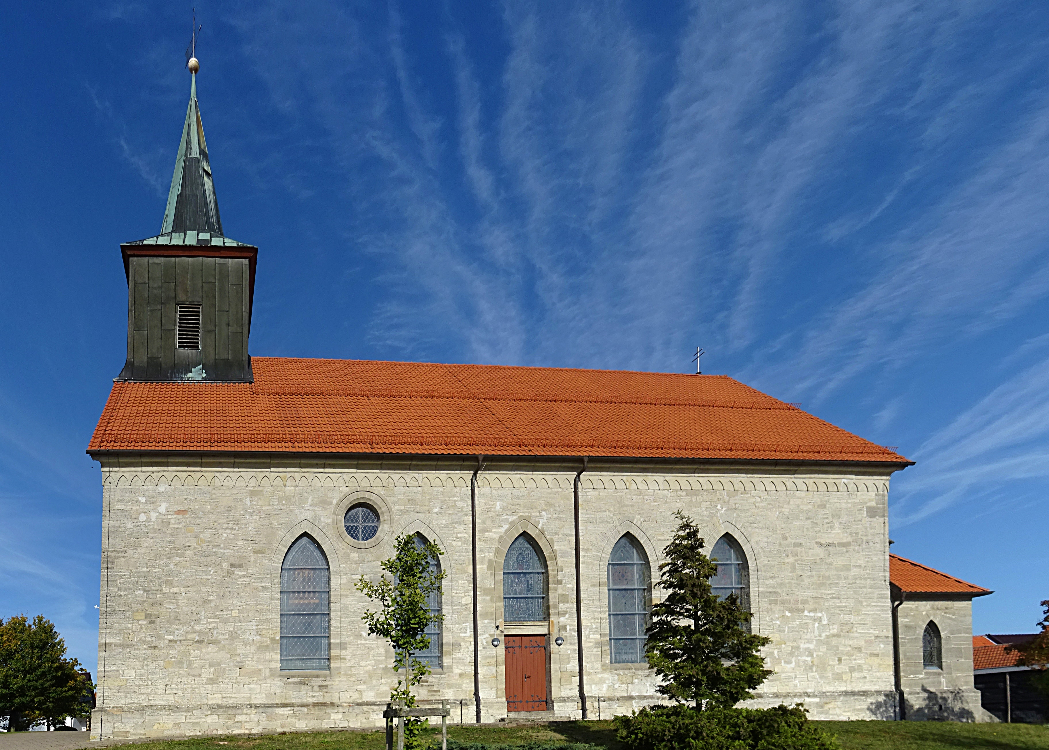 Pfarrkirche St. Michael (Wachstedt), erbaut 1840 – 1845